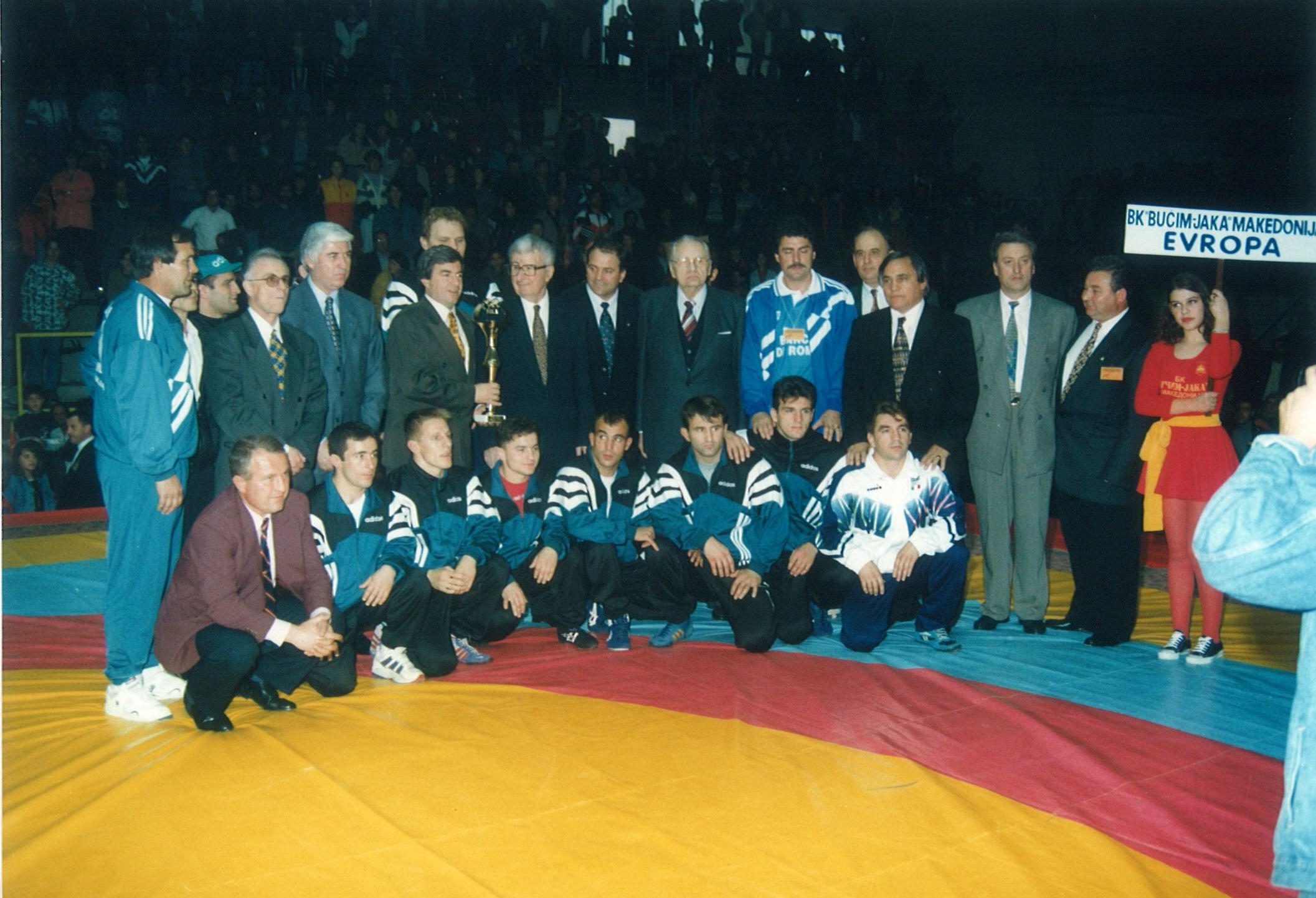 Со европскиот и светски шампион во клупско борење Бучим Јака и тогашниот претсетадел на Македонија Киро Глигоров